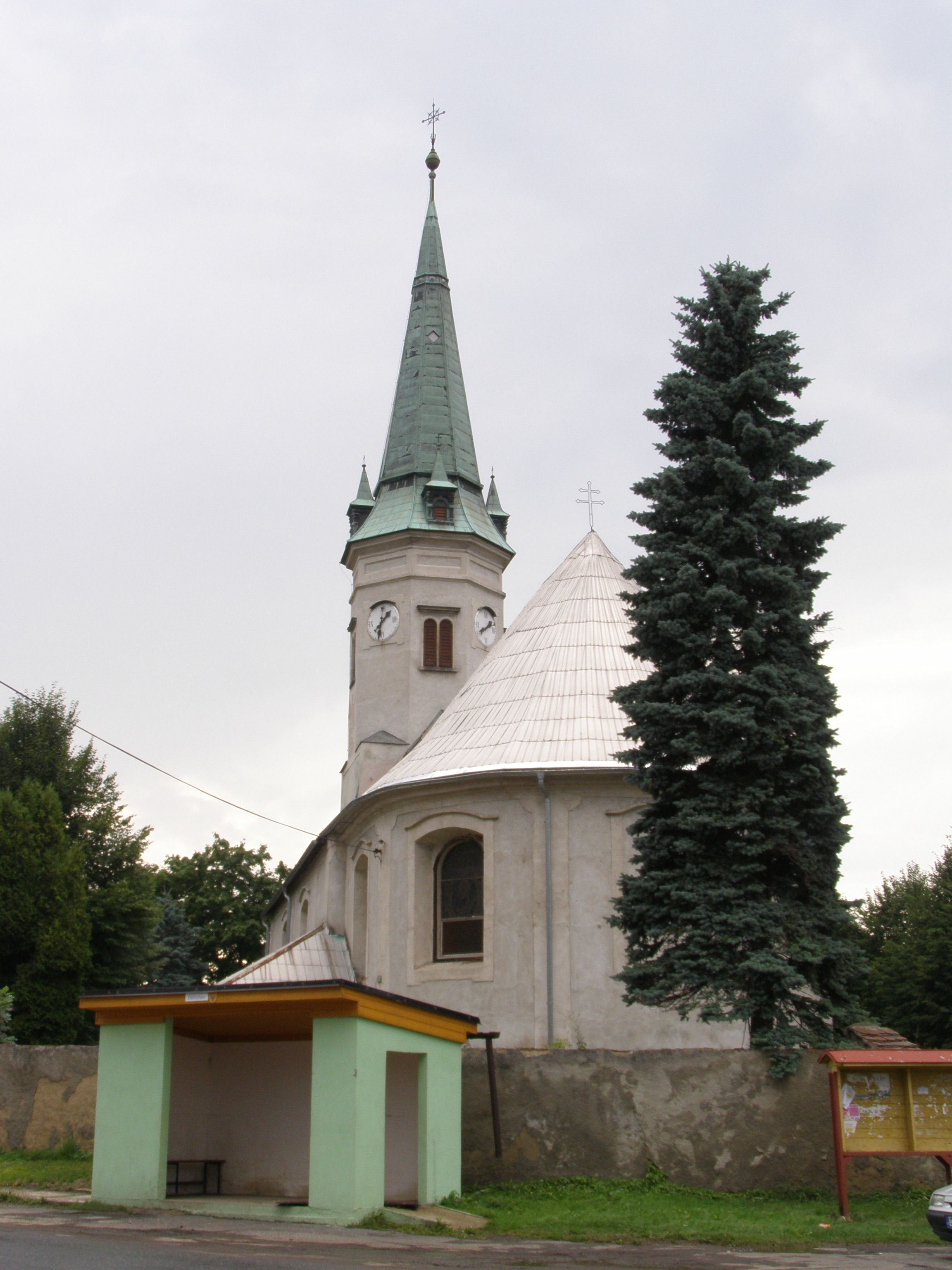 Dětřichov, Kostel svaté Anny